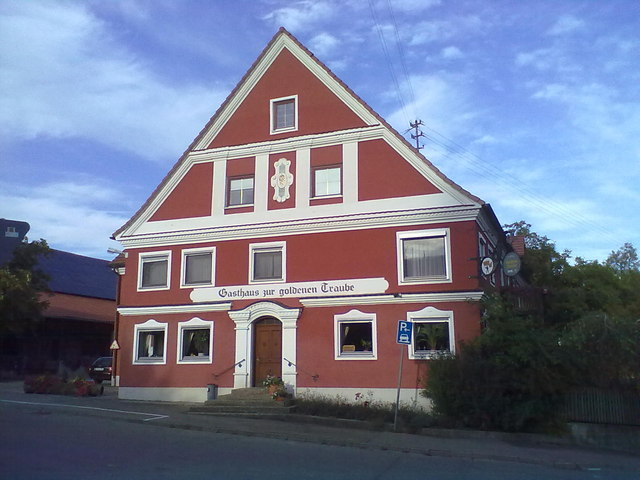 Gasthaus zur goldenen Traube - Witzighausen